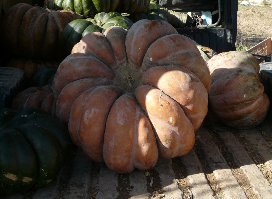 Courge de Provence (Cucurbita moschata)